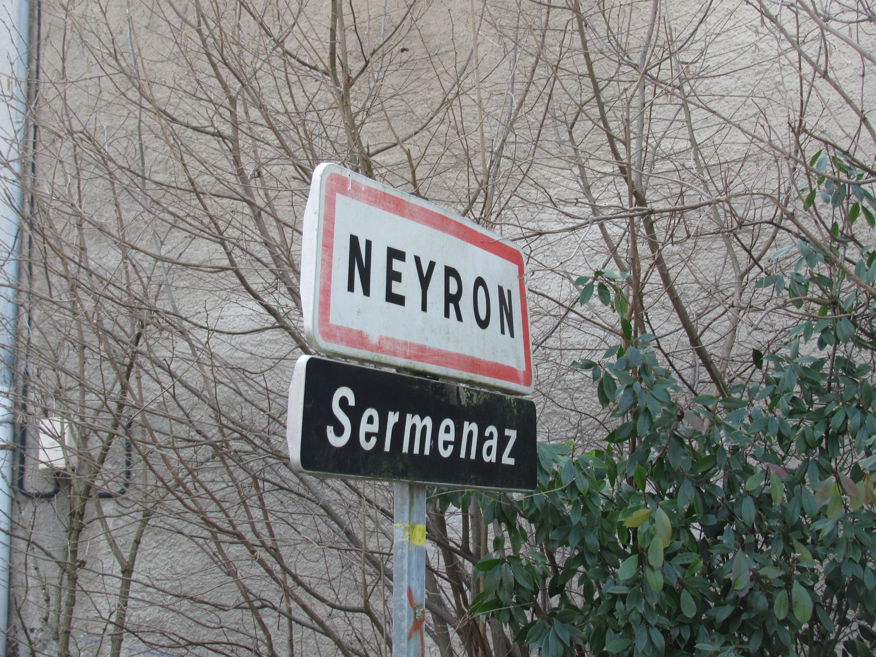 Panneau Neyron Sermenaz.